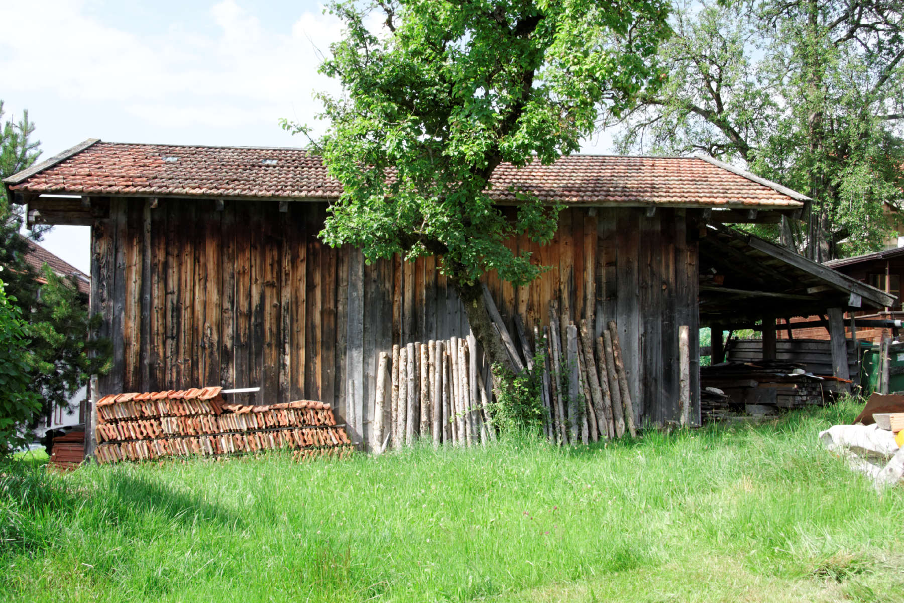 Saulgrub, Getreidekasten im Wieskopfweg 1 im Ortsteil Wurmansau